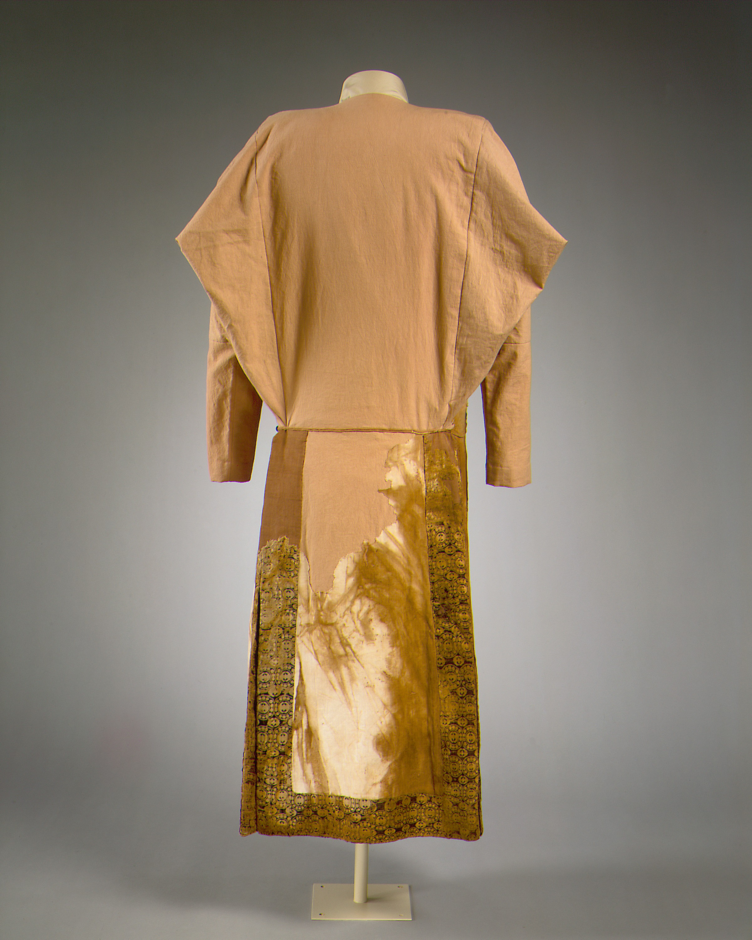 Textile; Textiles-Costumes